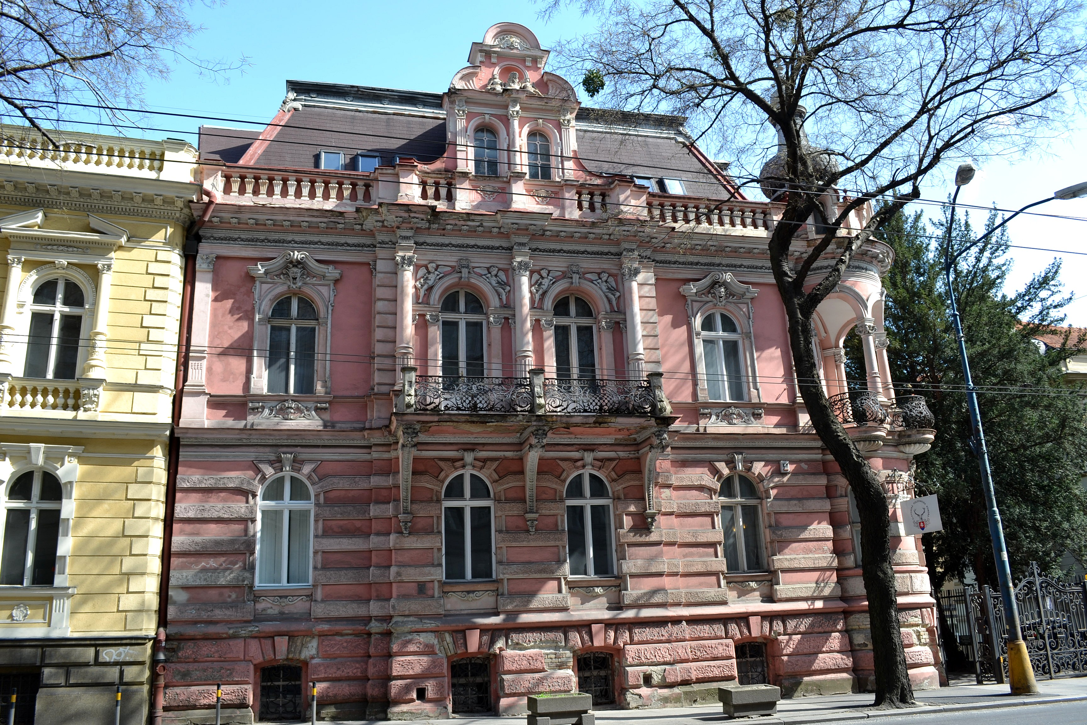 Eklektická vila na Štefánikovej ul. č. 10. V roku 1895 ju postavila firma Kittler a Gratzl. V budove dnes sídli Poľovnícky zväz